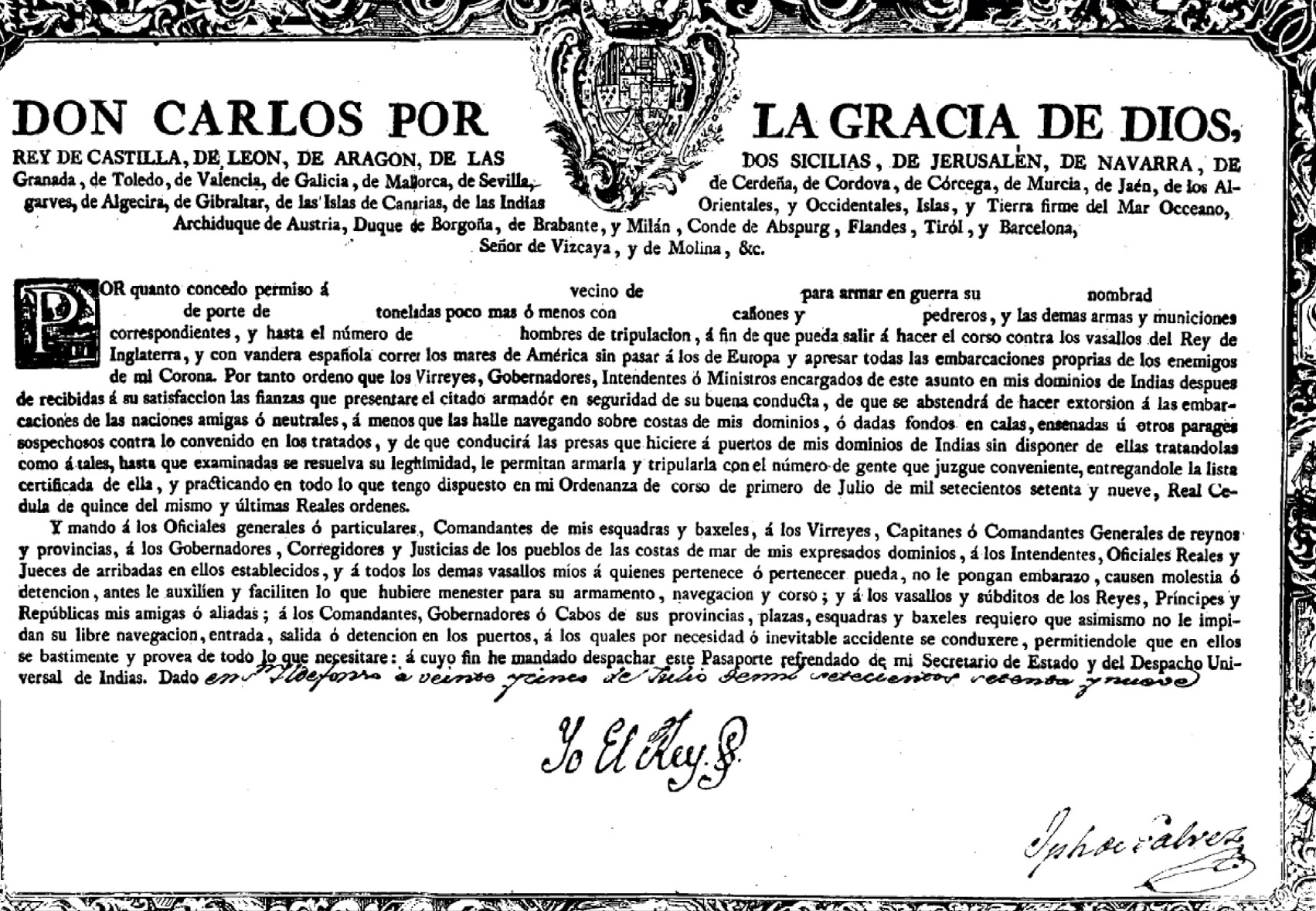 Real Licencia para armar en Guerra Embarcaciones. San Ildefonso, 1779, con firma real (estampilla), orla, capitular y escudo grab, firma en esq. inf. derecha Jph de Galvez (José de Gálvez y Gallardo)